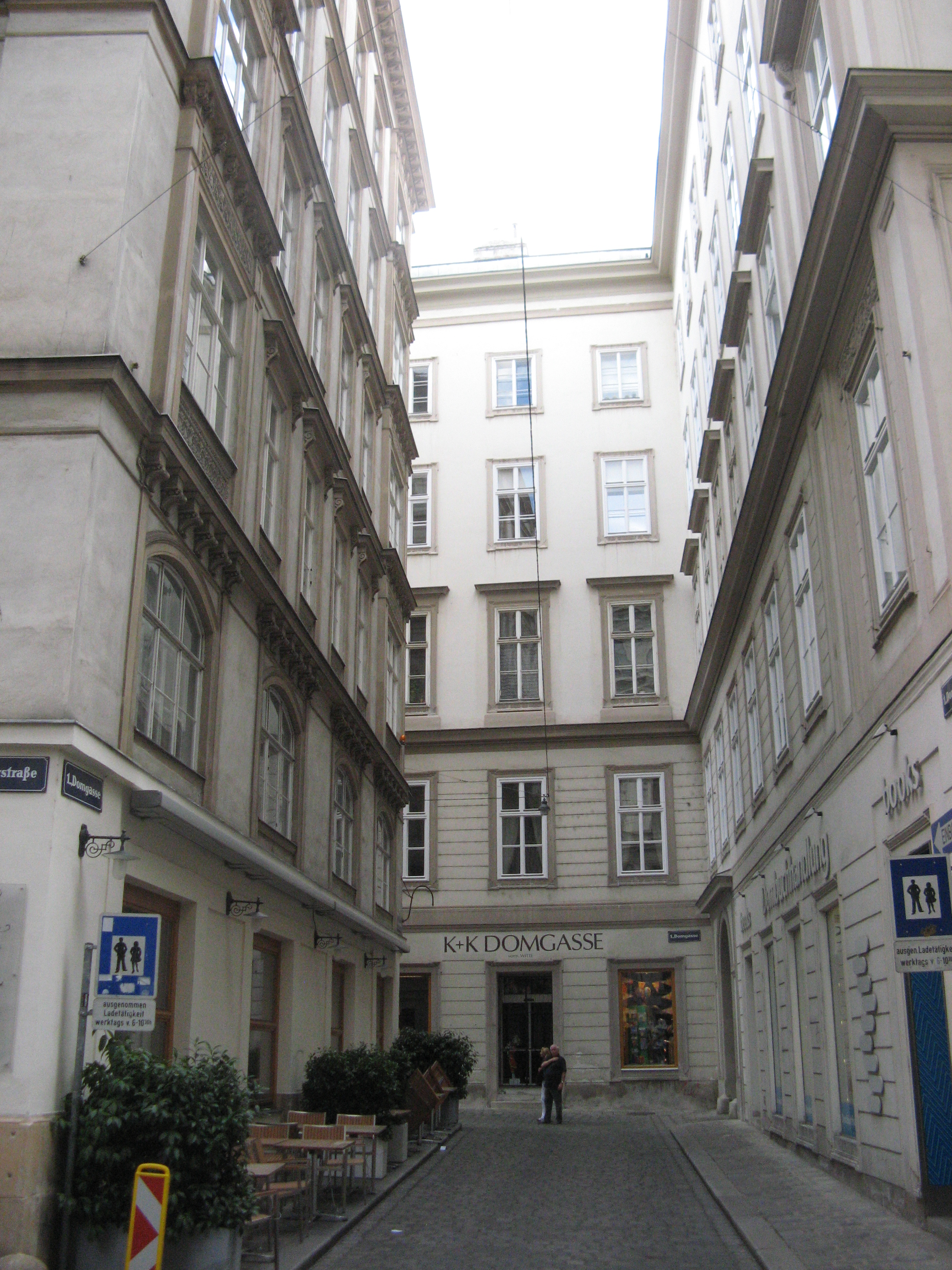 Domgasse von der Schulerstraße aus gesehen, Wien-Innere Stadt